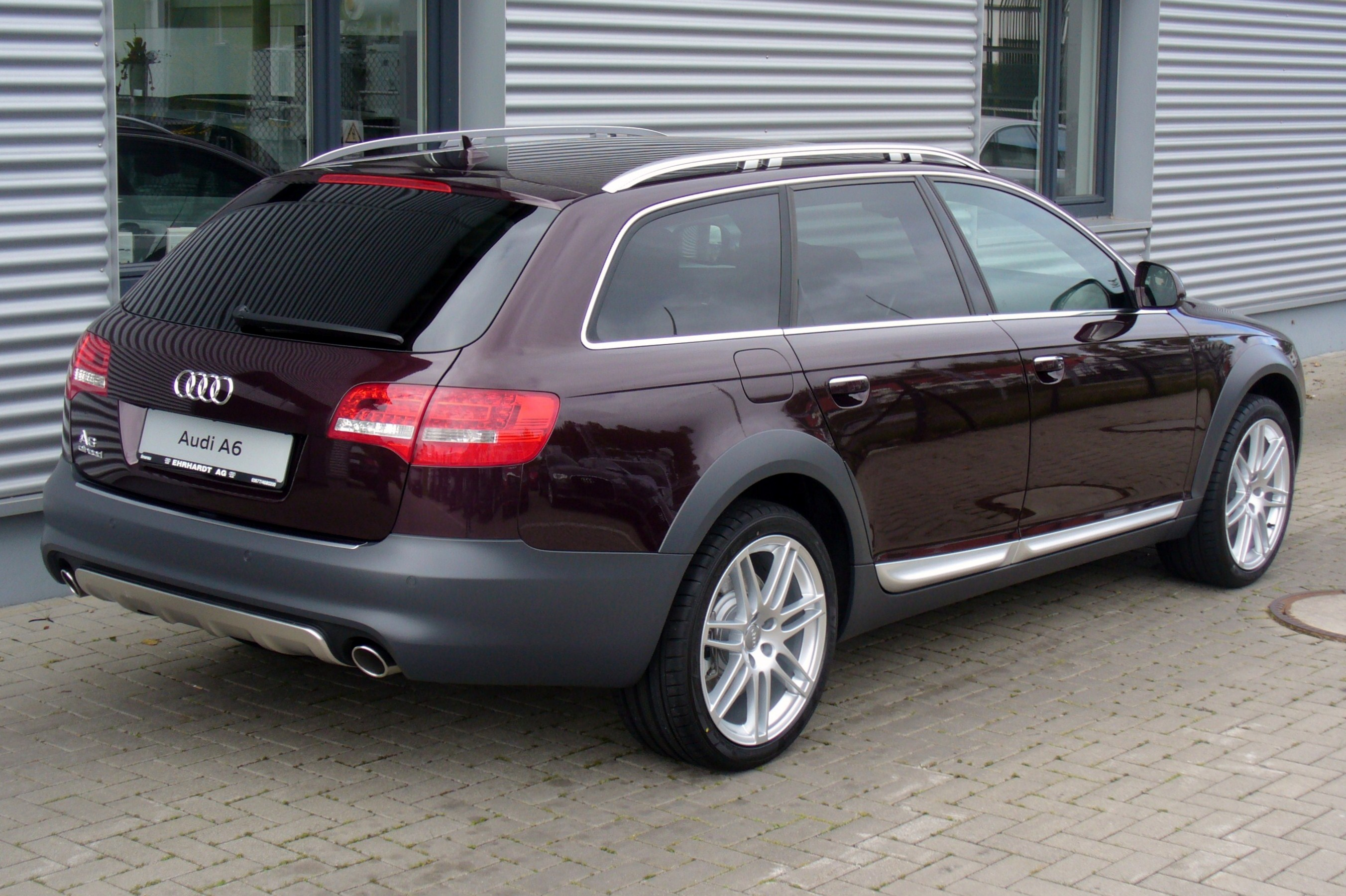 Audi A6 allroad quattro